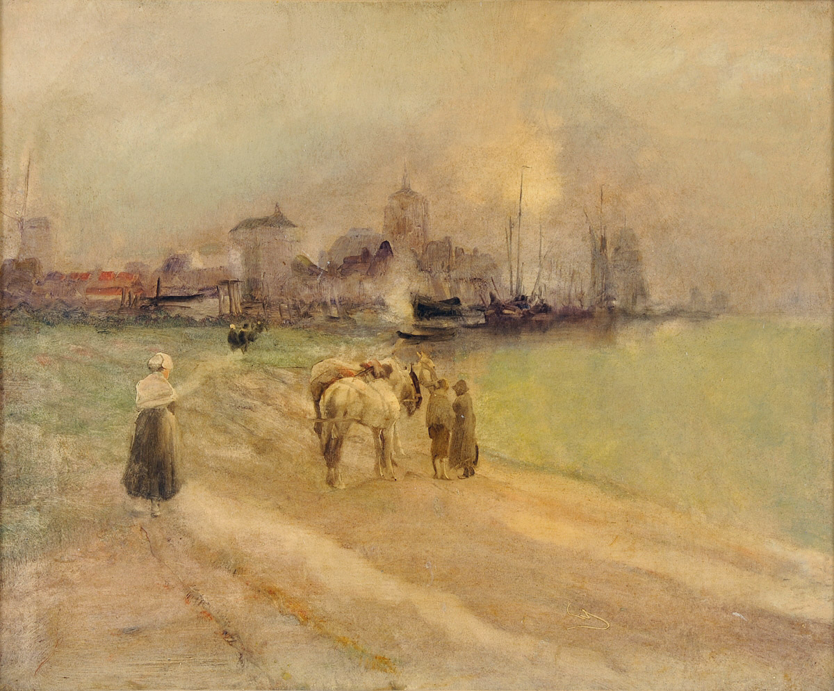 Stadtansicht am Niederrhein. Monogrammiert. Mischtechnik auf Papier, 56 x 68 cm